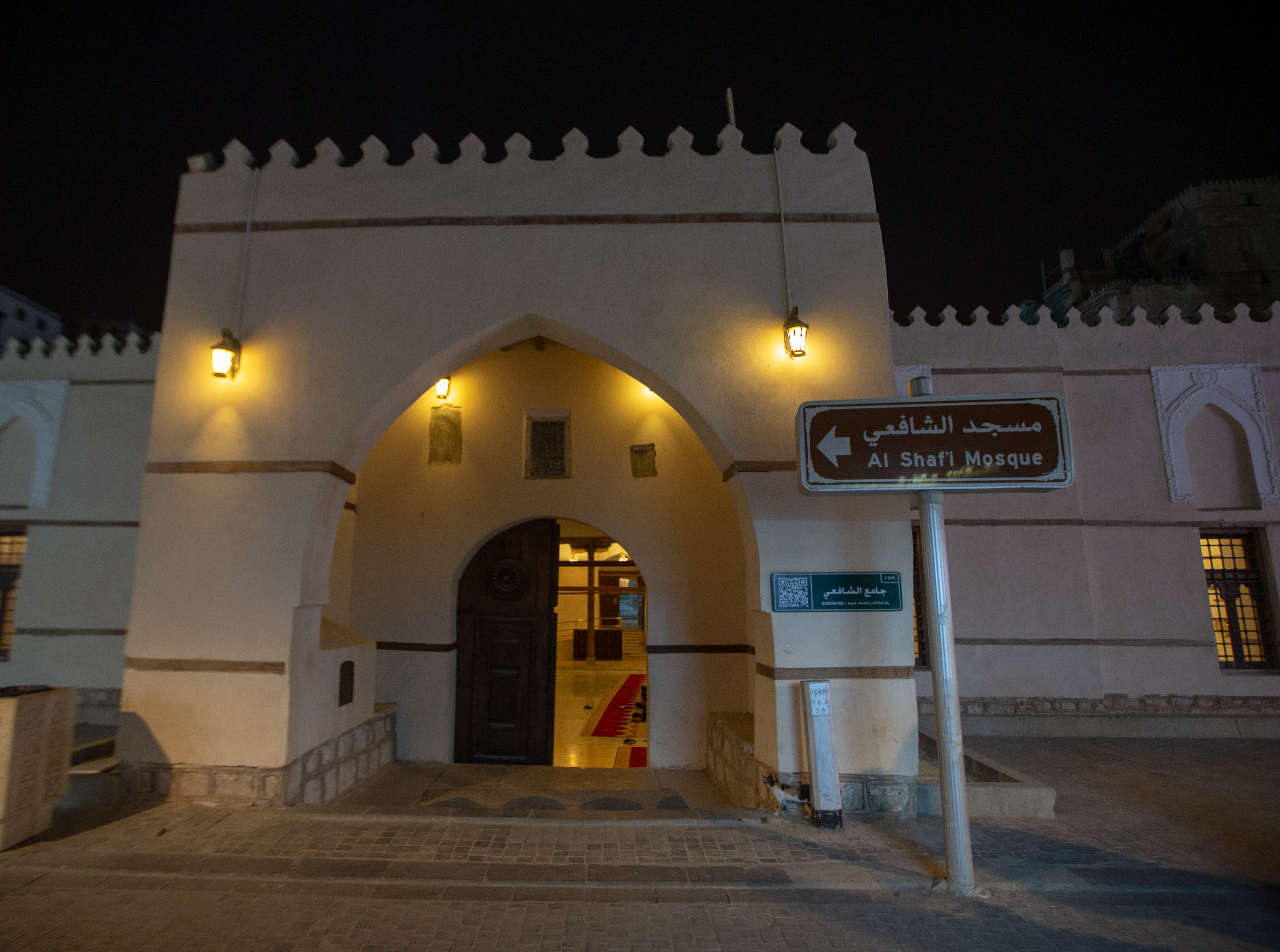 مسجد الشافعي في مدينة جدة